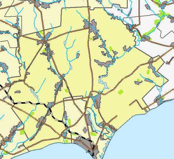 Бердянский район, Запорожская область, Украина